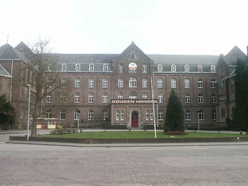 's-Heerenberg: klooster "Don Rua", later: "Gouden Handen"